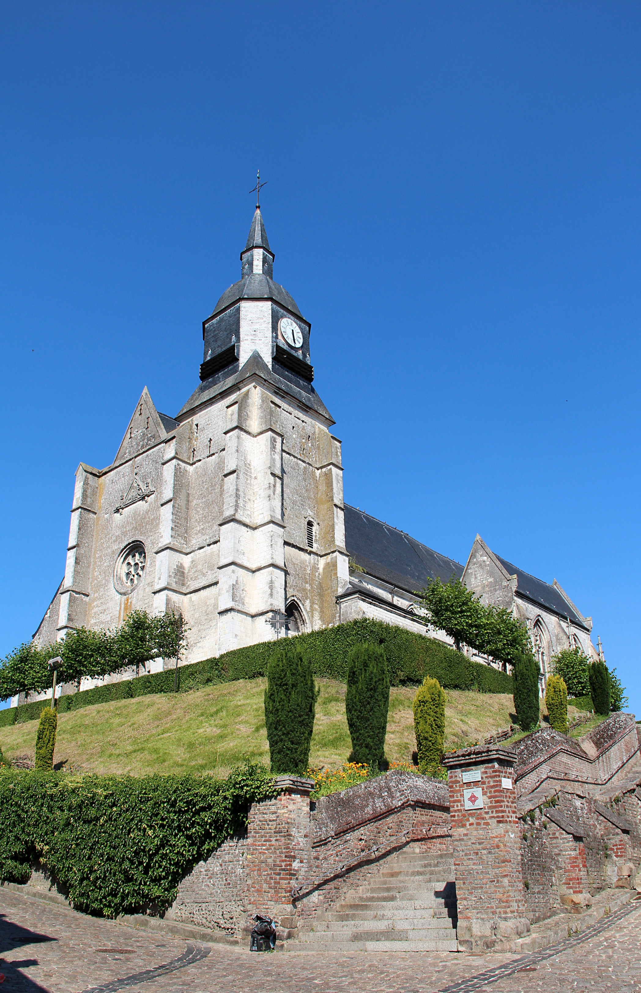 Auxi-le-Château (Pas-de-Calais) - France, l'église Saint-Martin (XVIème sièce).